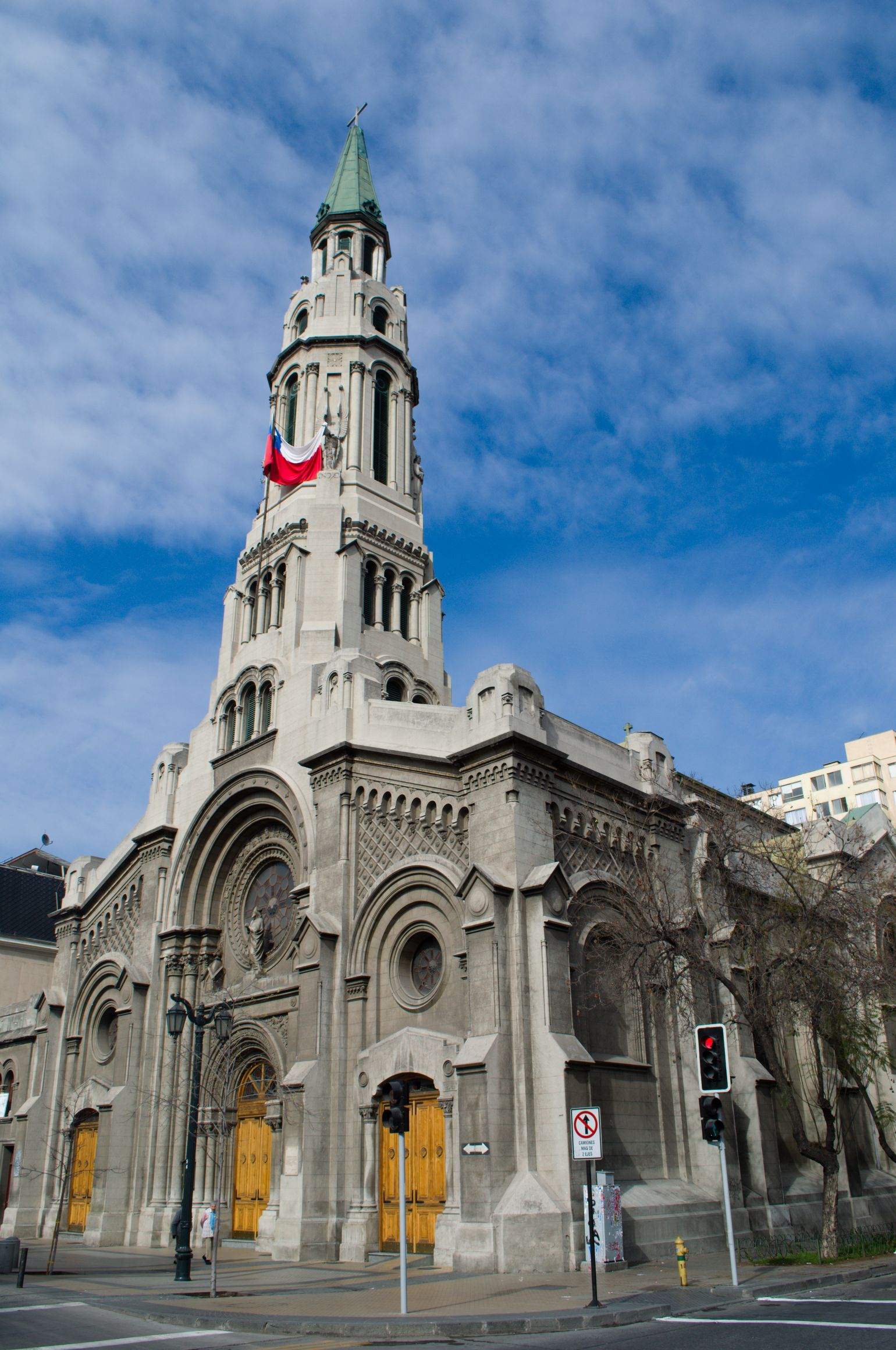 Iglesia San Lázaro, vista hacia calle Gorbea This is a photo of a national monument in Chile: 883